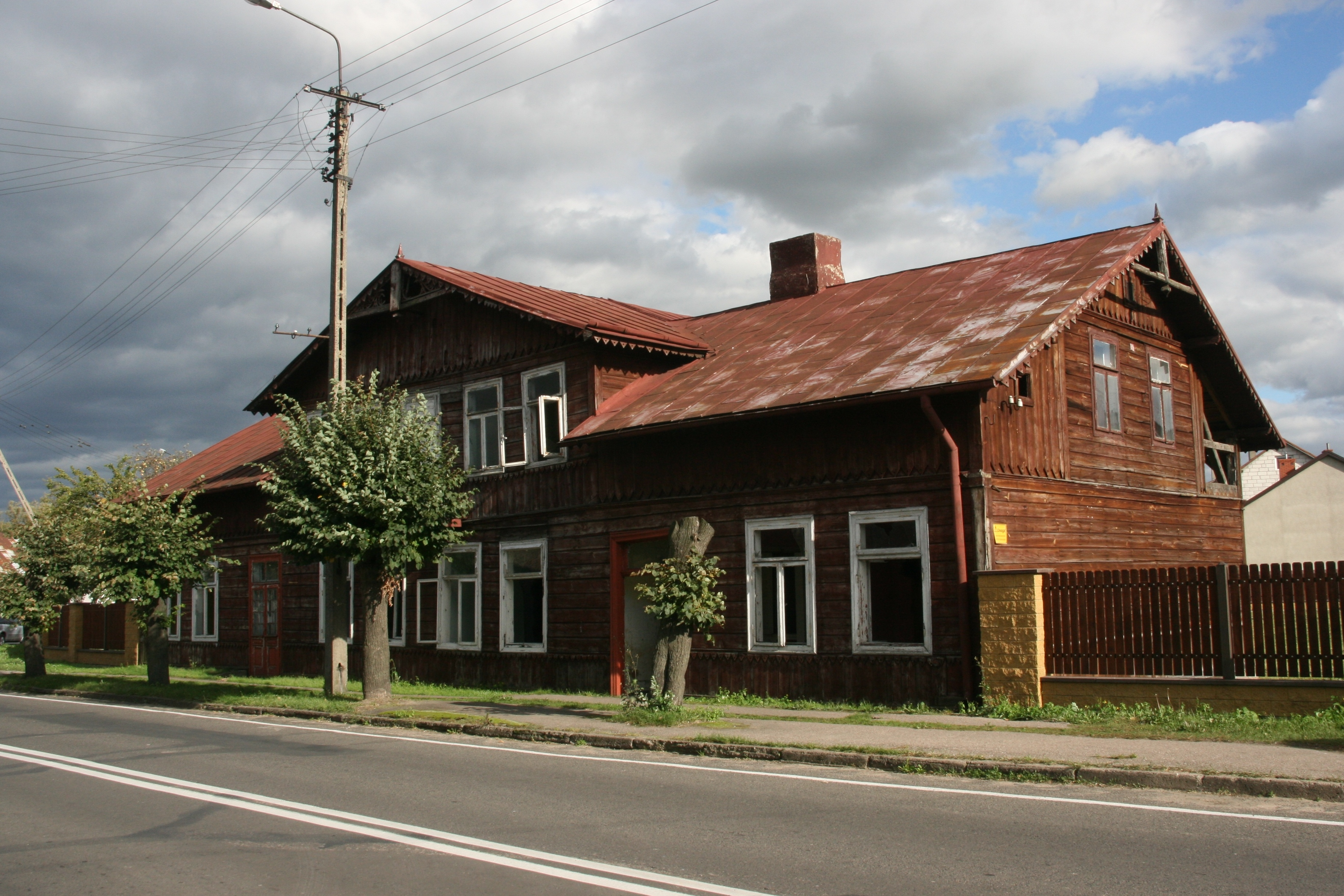 Dom drewniany początek XX w. Bieżuń ul. Sierpecka 23, Gmina Bieżuń